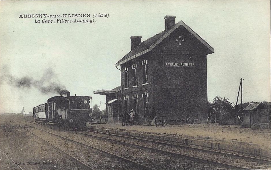 La halte de Villers-Aubigny vers 1910